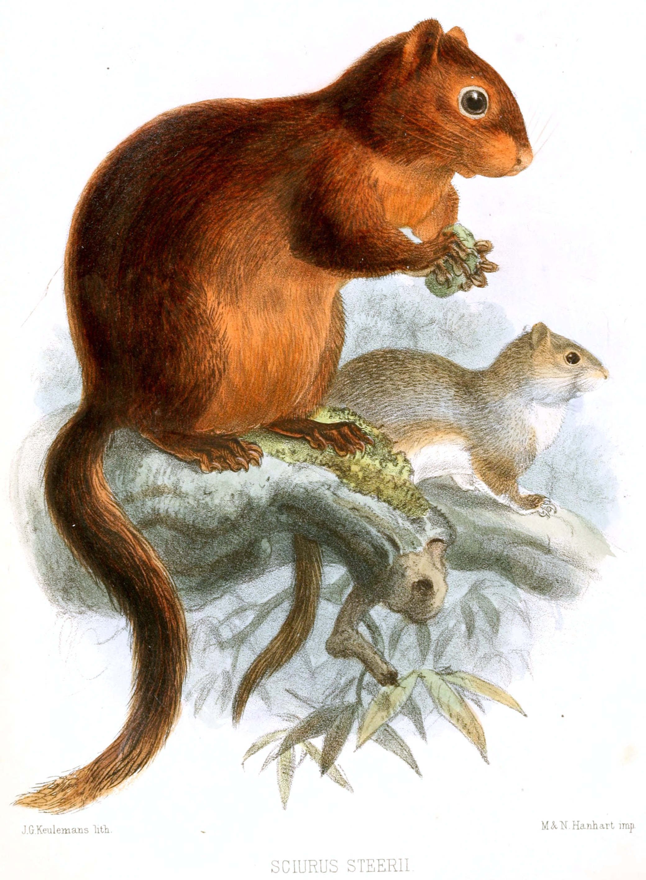 Sciurus steerii = Sundasciurus steerii